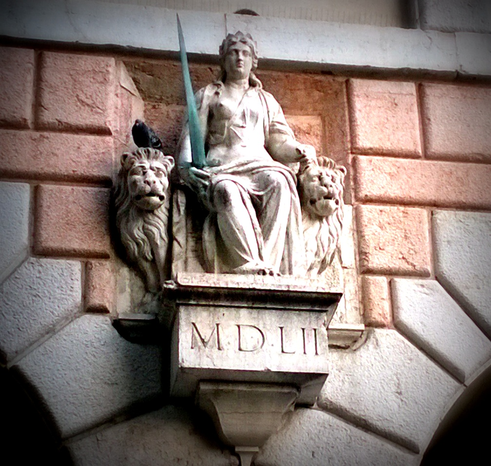 La Statua della Giustizia al Palazzo del Podestà a Padova.